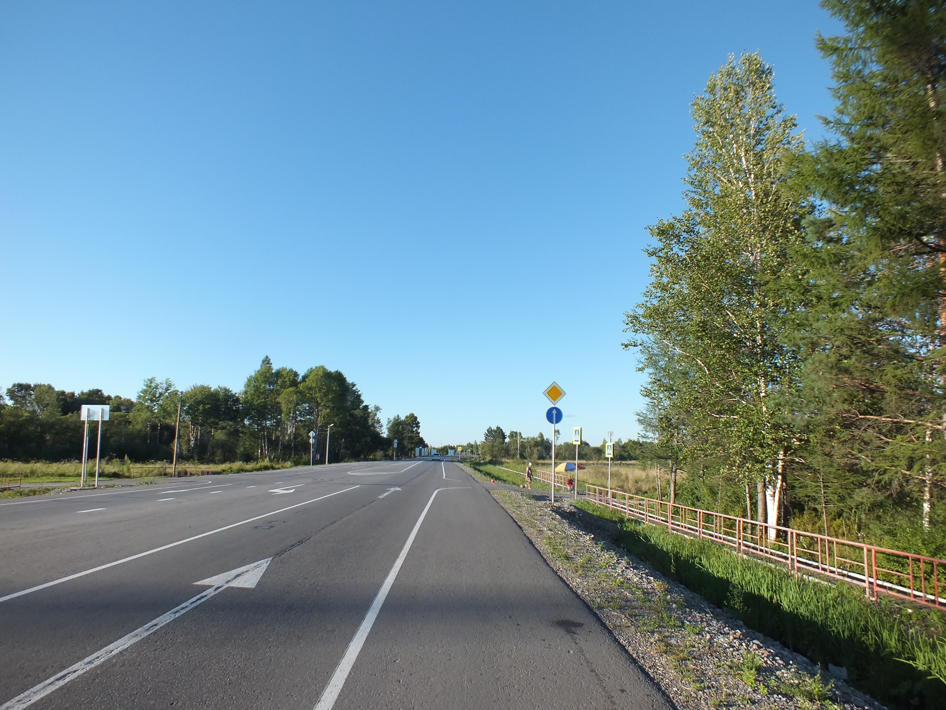 Пос. Дормидонтовка Хабаровский край